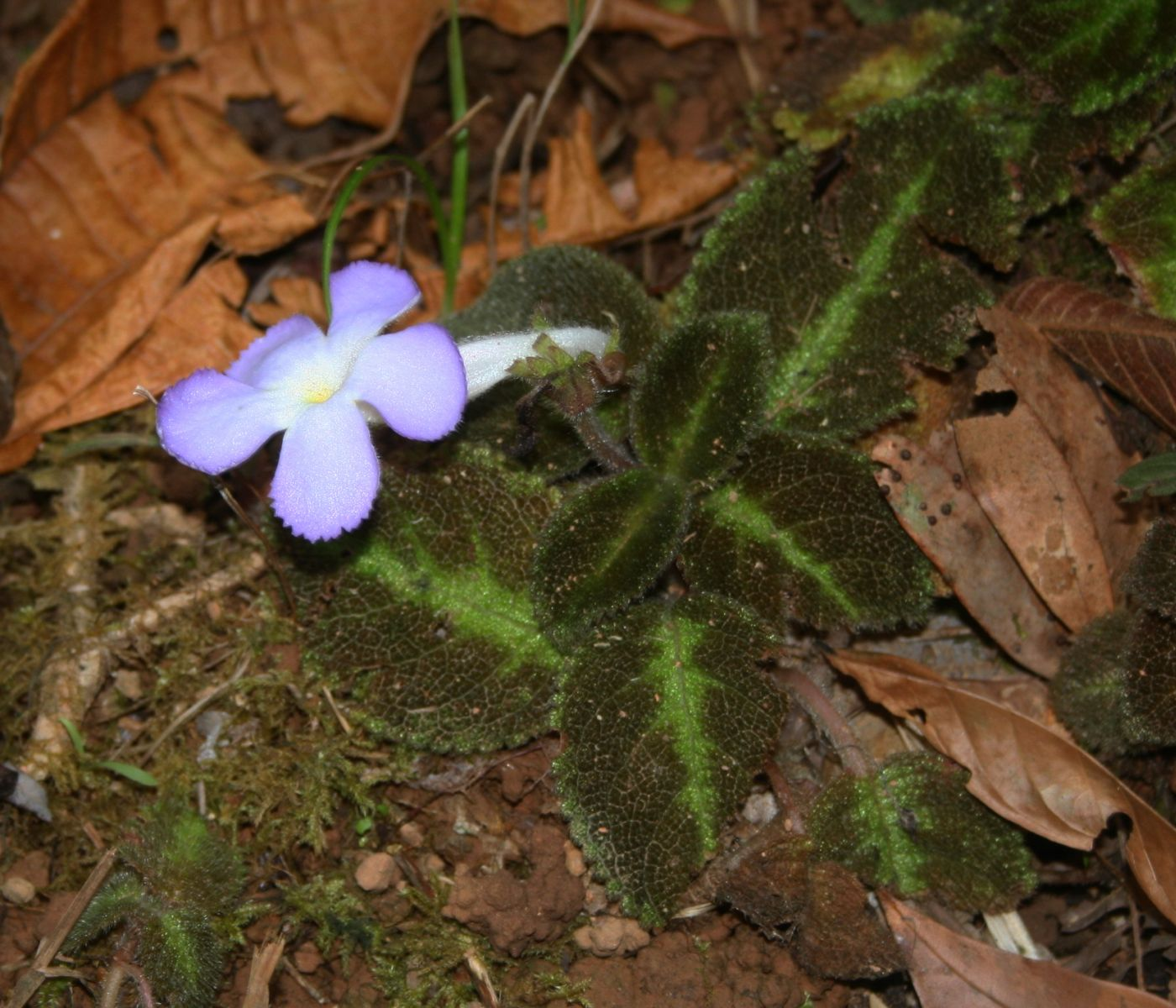 Episcia lilacina, Gesneriengewächse (Gesneriaceae) - Costa Rica: Prov. Puntarenas, La Gamba NW Golfito, "Fila Trail" NW "Tropenstation La Gamba"/"Estación Biológica La Gamba"